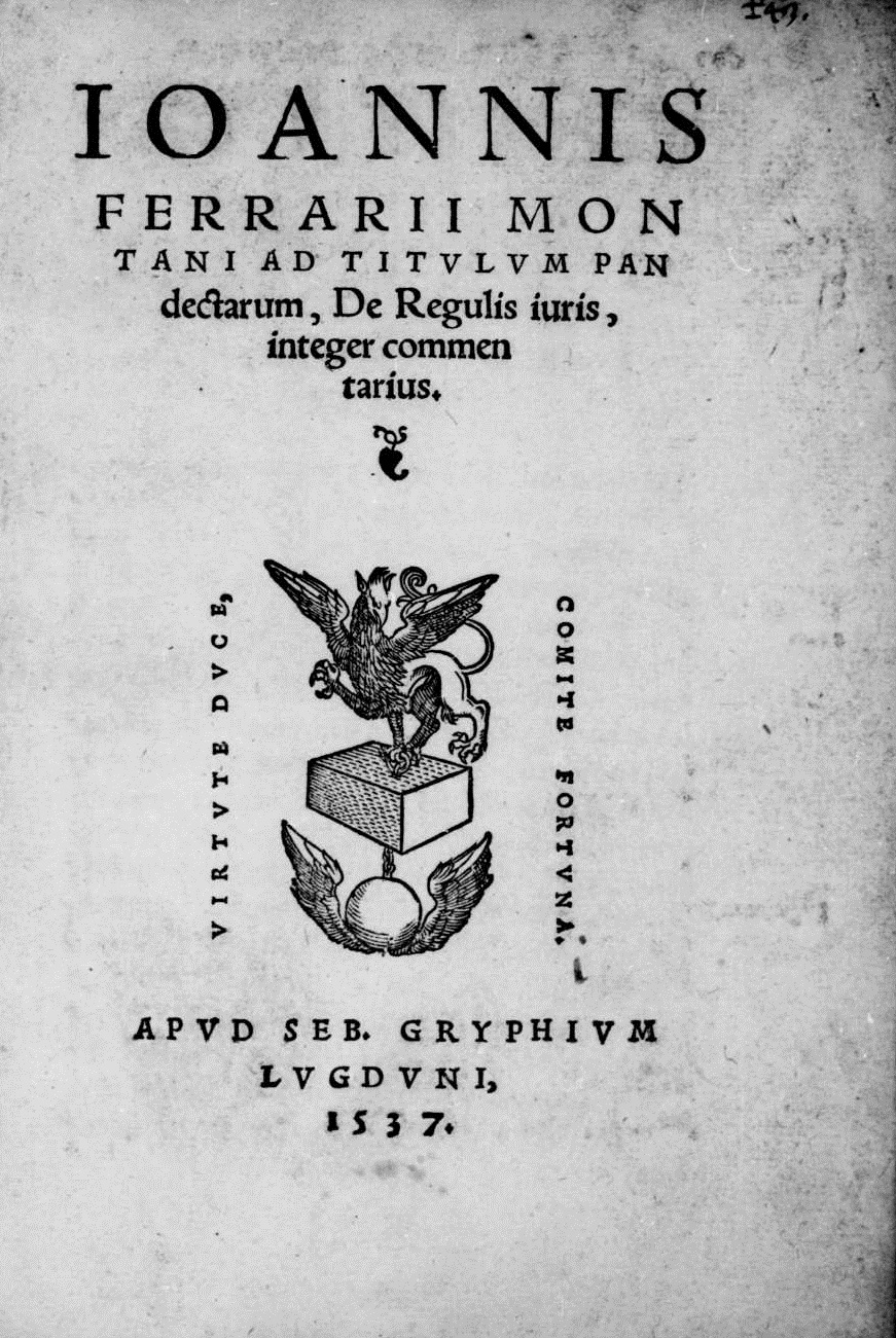 Frontespizio